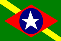 É a imagem da bandeira do municipio de Bragança